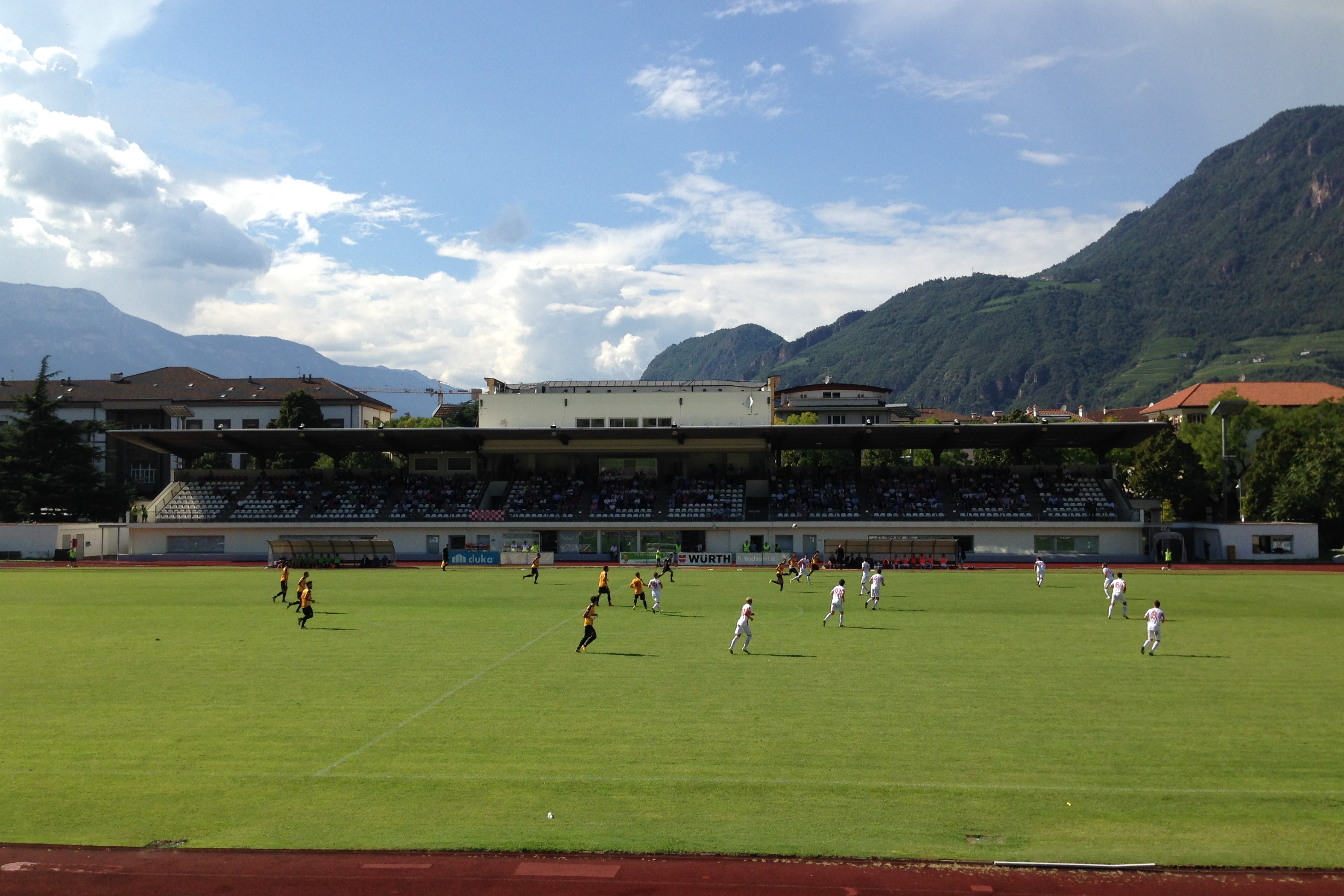 Drususstadion in Bozen - Haupttribüne